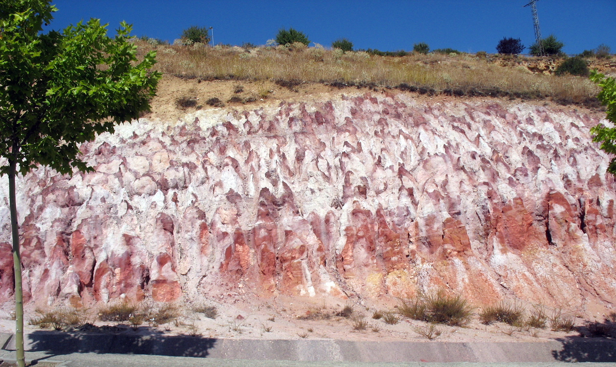 Ferruginizaciones lateríticas (paleosuelo) en las areniscas en facies Utrillas en La Lastrilla, Segovia, España. Camino de San Cristobal. El color blanco se debe a la presencia de caolín.